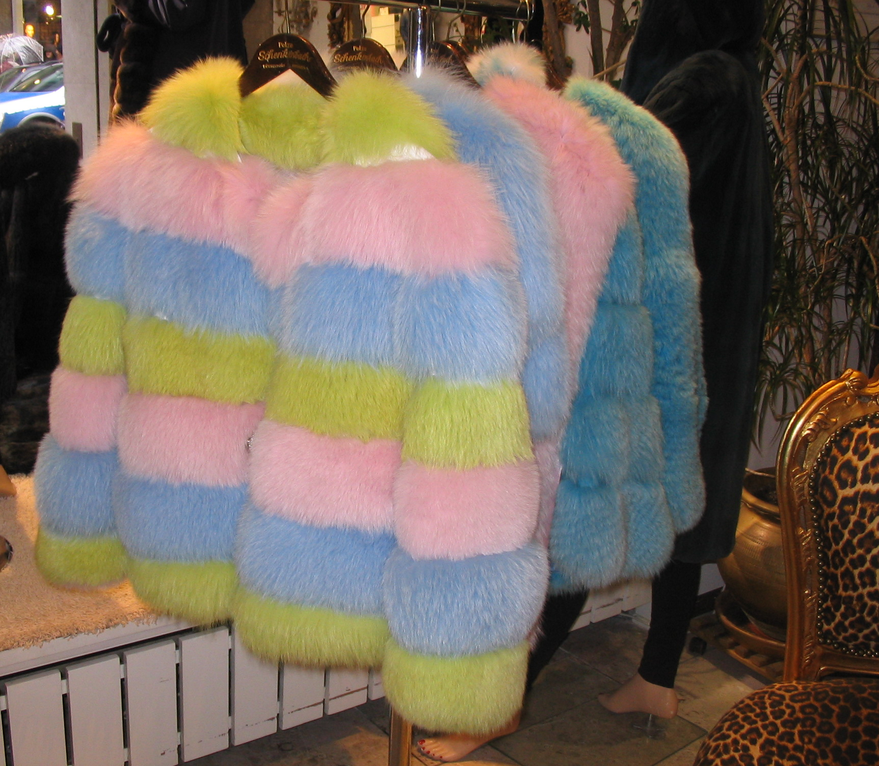 Fuchsjacken, gefärbt. Gesehen im Pelzhaus Schenkenbach, Düsseldorf.